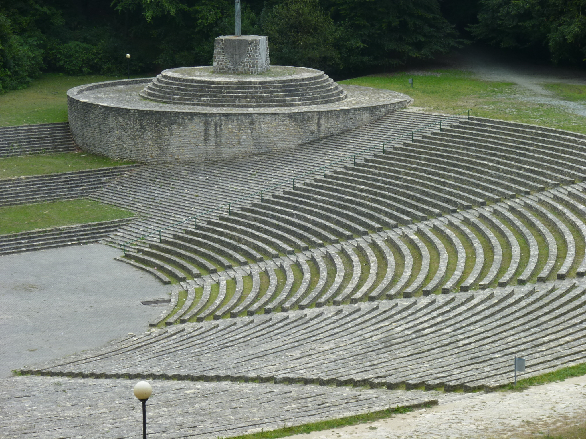 Deutsches Ehrenmal für die in den Aufständen in Oberschlesien gefallenen Freikorpskämpfer auf dem St. Annaberg